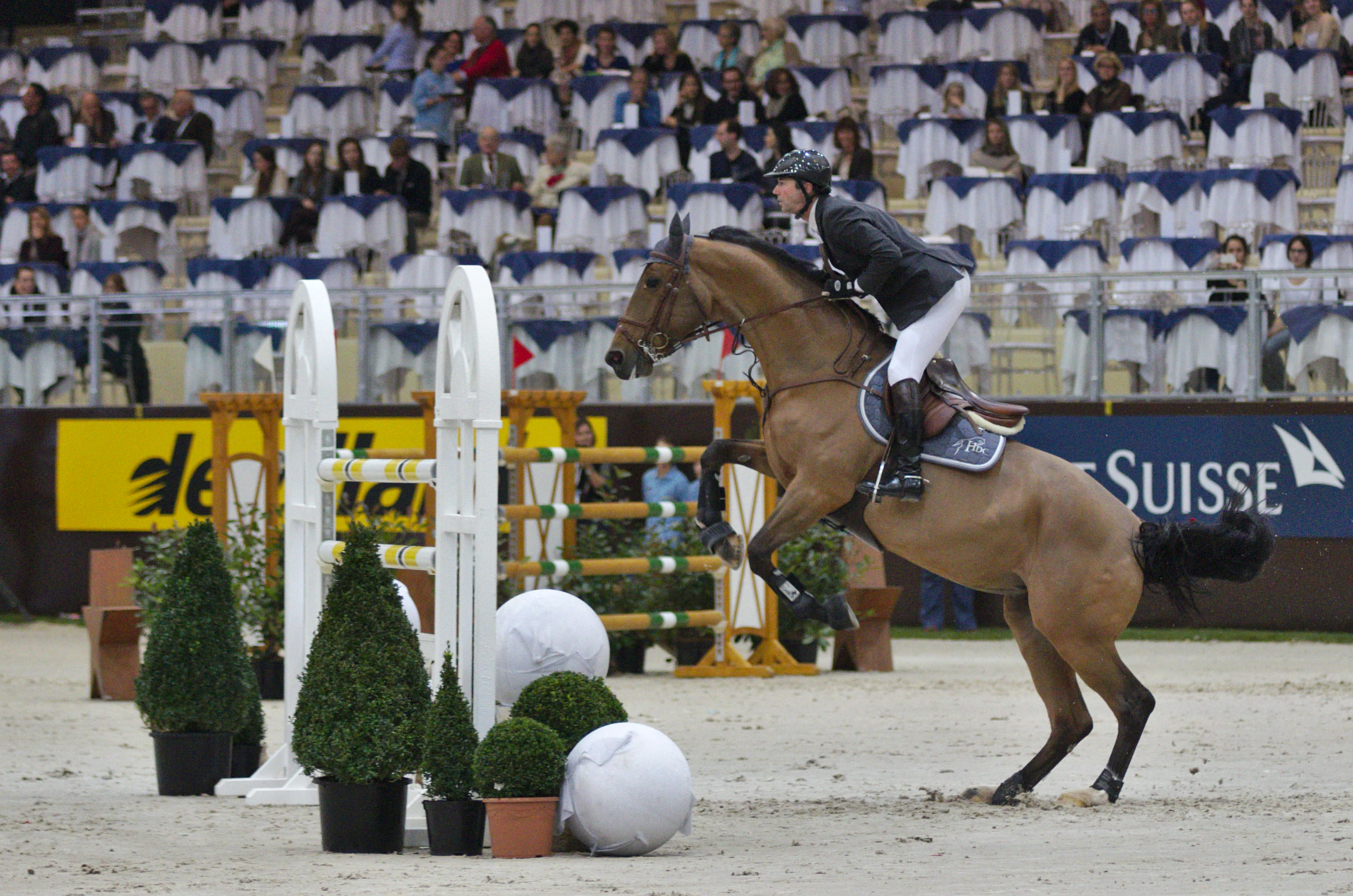 CHI Genève 2013 - 20131214 - Patrice Delaveau et Ornella Mail HDC